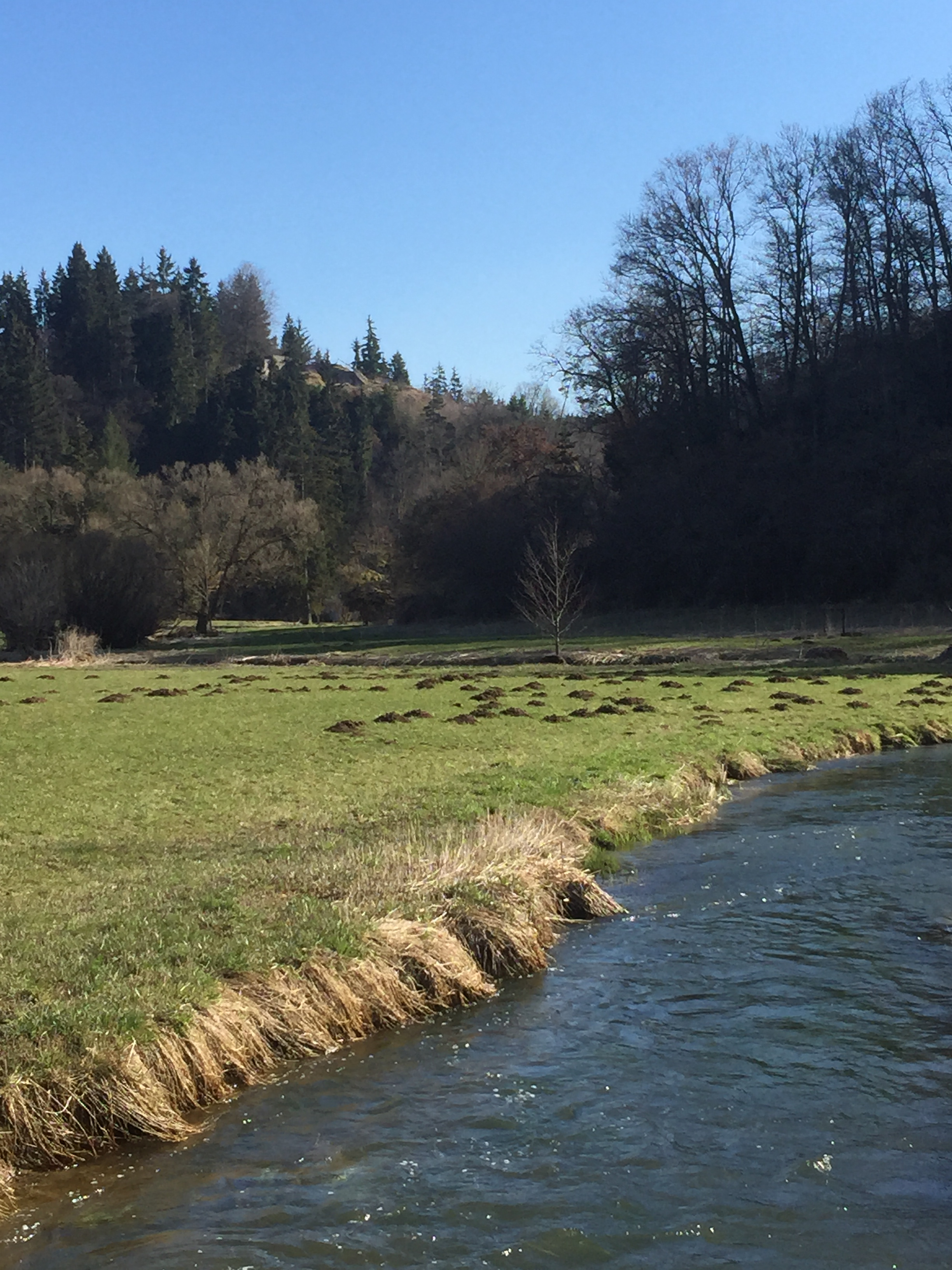 Ruine Baldenstein oberhalb der Fehla, die hier im Naturschutzgebiet „Fehlatal“ liegt